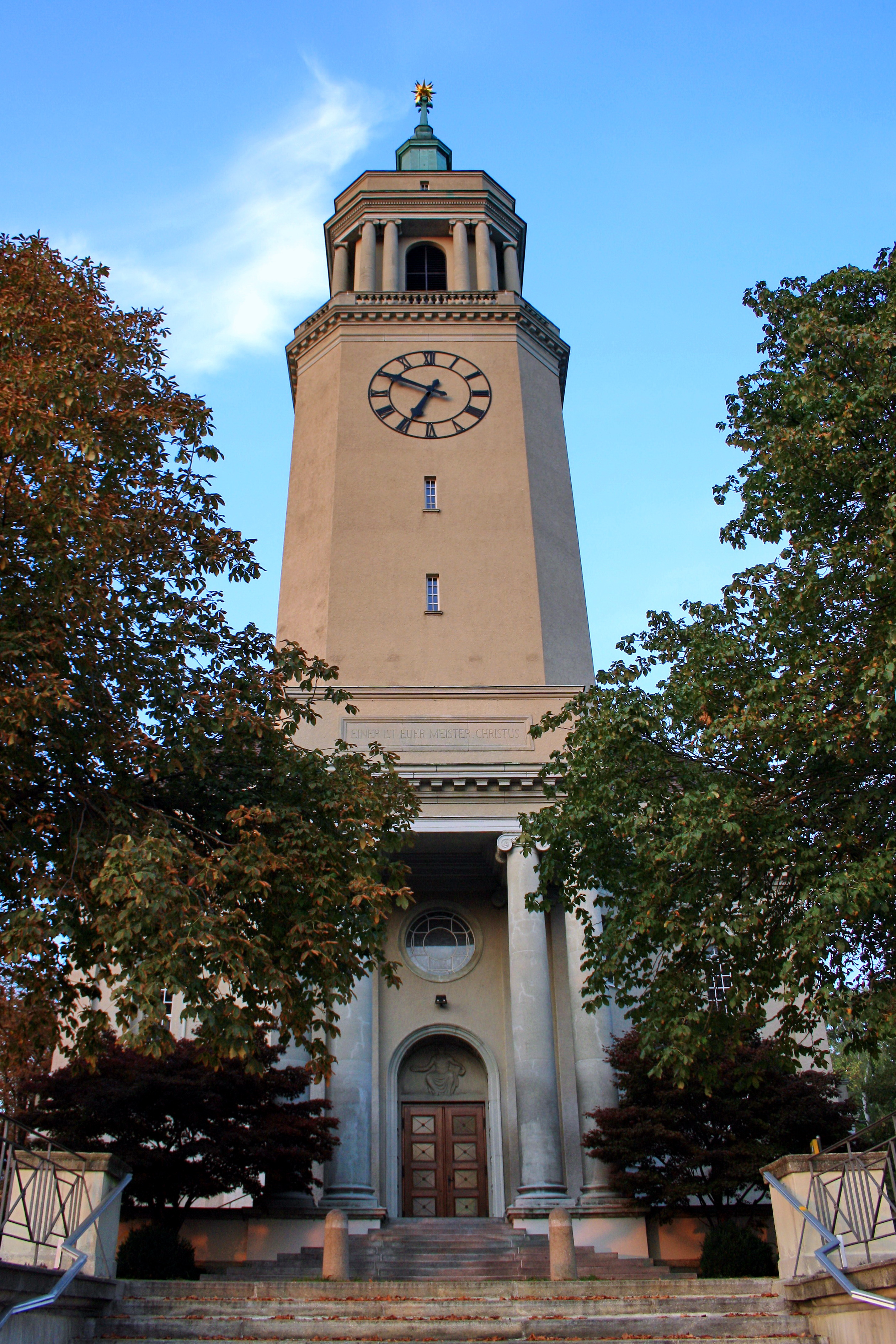 Grosse Kirche in Zürich-Fluntern